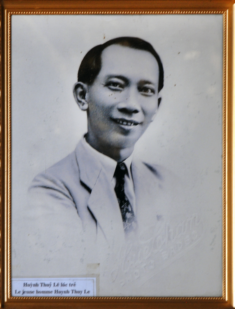 Portrait de M. Huynh Thuy Le (l'amant chinois du roman de Marguerite Duras) Sa Dec est une petite bourgade au bord du Mékong possédant quelques belles maisons et des bâtiments publics (marché, école,..) datant de l'époque coloniale. On y trouve aussi des temples chinois. Elle était autrefois appelée "le jardin de la Cochinchine" en raison du nombre d'arbres qui existaient dans cette région. La ville de Sa Dec est connue dans le monde grâce à l'oeuvre de Marguerite Duras, en particulier à son roman "l'Amant" qui a reçu le Prix Goncourt en 1984 et dont un film a été tiré. Ce film franco-britannico-vietnamien, adapté du roman de Marguerite Duras, a été réalisé par Jean-Jacques Annaud, il est sorti en 1992. La mère de Marguerite Duras était institutrice et directrice de l'école de Sa Dec lorsque Marguerite Duras, âgée d'une quinzaine d'années à l'époque, a rencontré un jeune chinois dont la famille vivait à Sa Dec. Ce jeune chinois de nom : Huynh Thuy Le (1906-1972) est enterré à Sa Dec La maison de cette riche famille chinoise a d'abord servi de poste de police puis est devenue récemment un musée. On y voit des photographies prises à l'époque et au moment du tournage du film. Article Wikipedia sur le film "l'Amant"